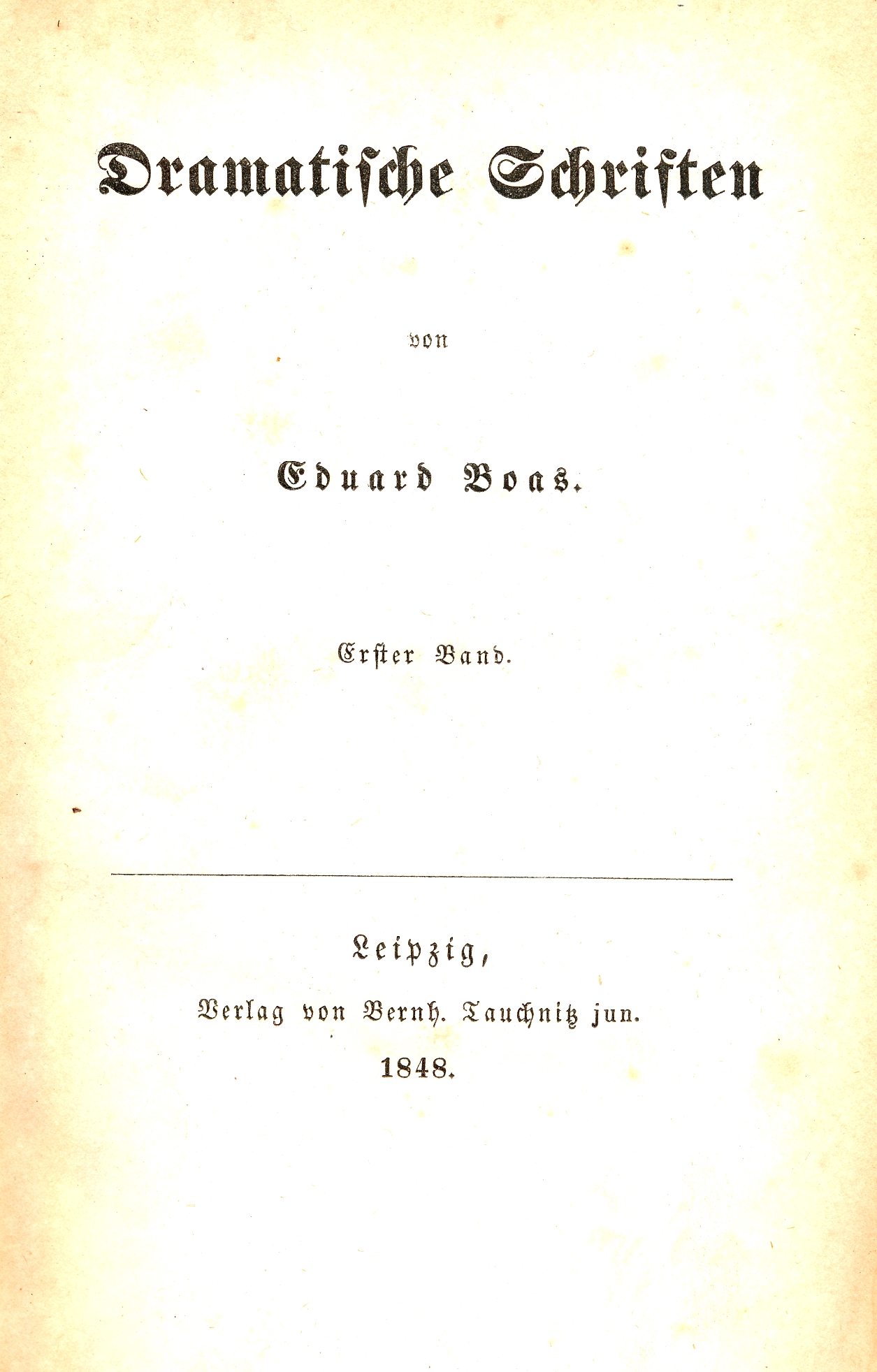 Eduard Boas: Dramatische Schriften, Leipzig 1848